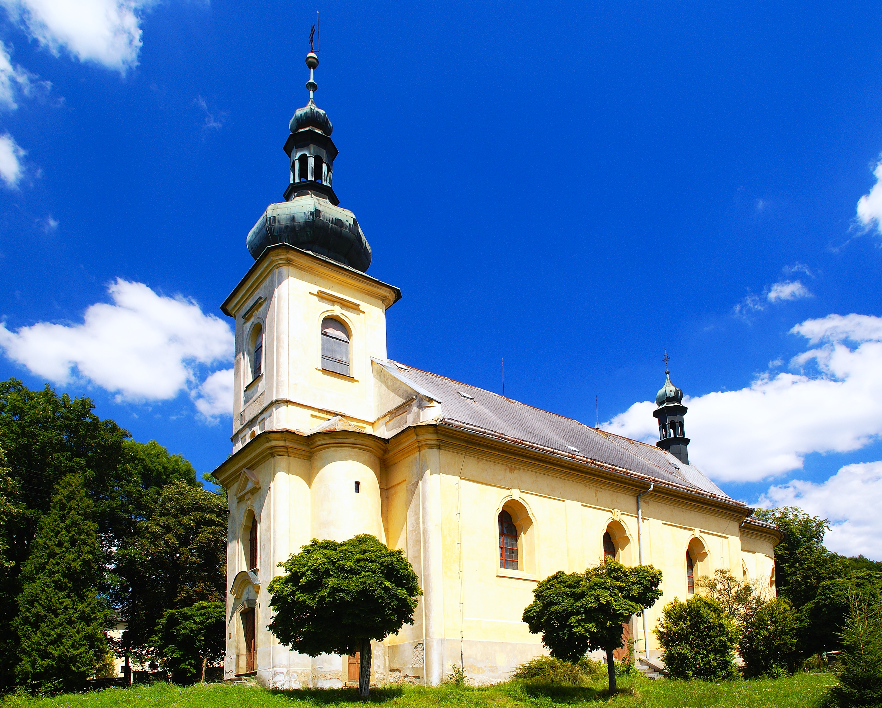 Barokní kostel Nanebevstoupení Páně v Brandýse nad Orlicí.